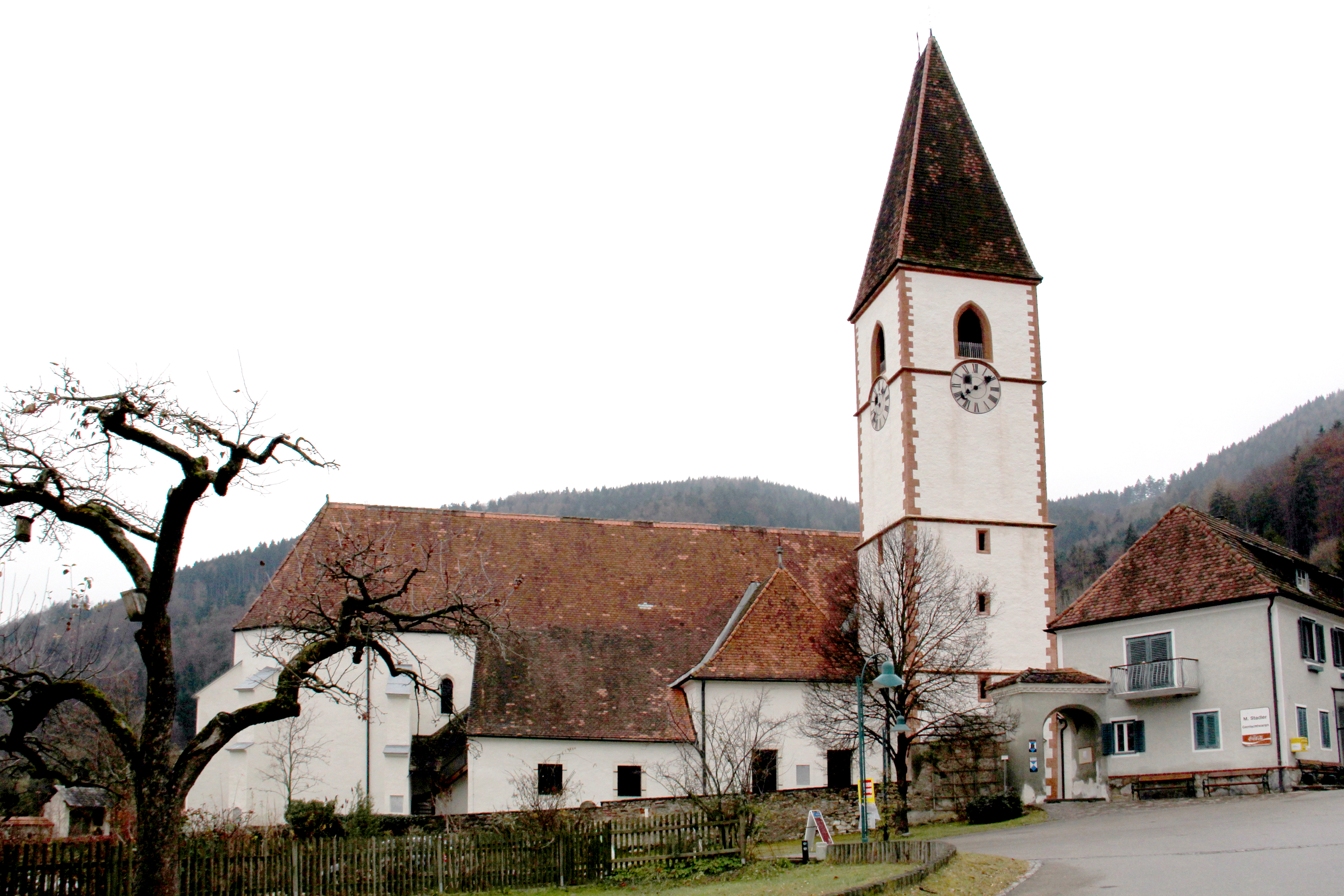 Kath. Filialkirche hl. Georg und Kirchhofanlage